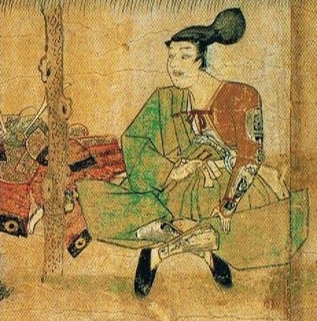 『蒙古襲来絵詞』後巻 絵二十一 弘安の役で九州に下向した安達盛宗